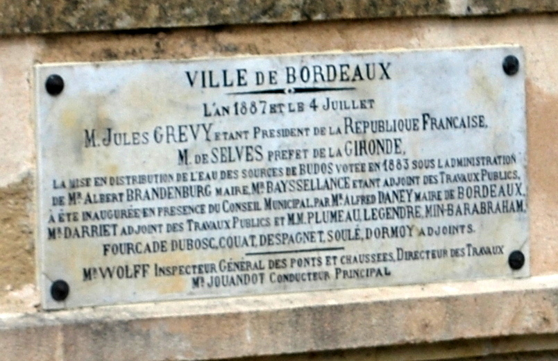 Aqueduc de Budos à Budos